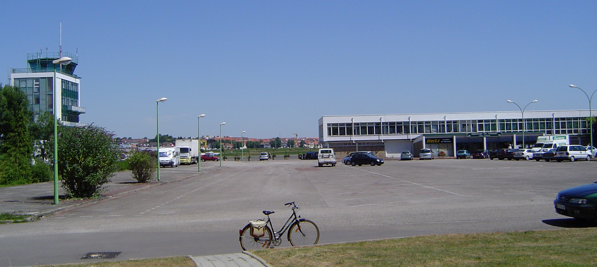 Photo prise par moi-même le 16 juillet 2006